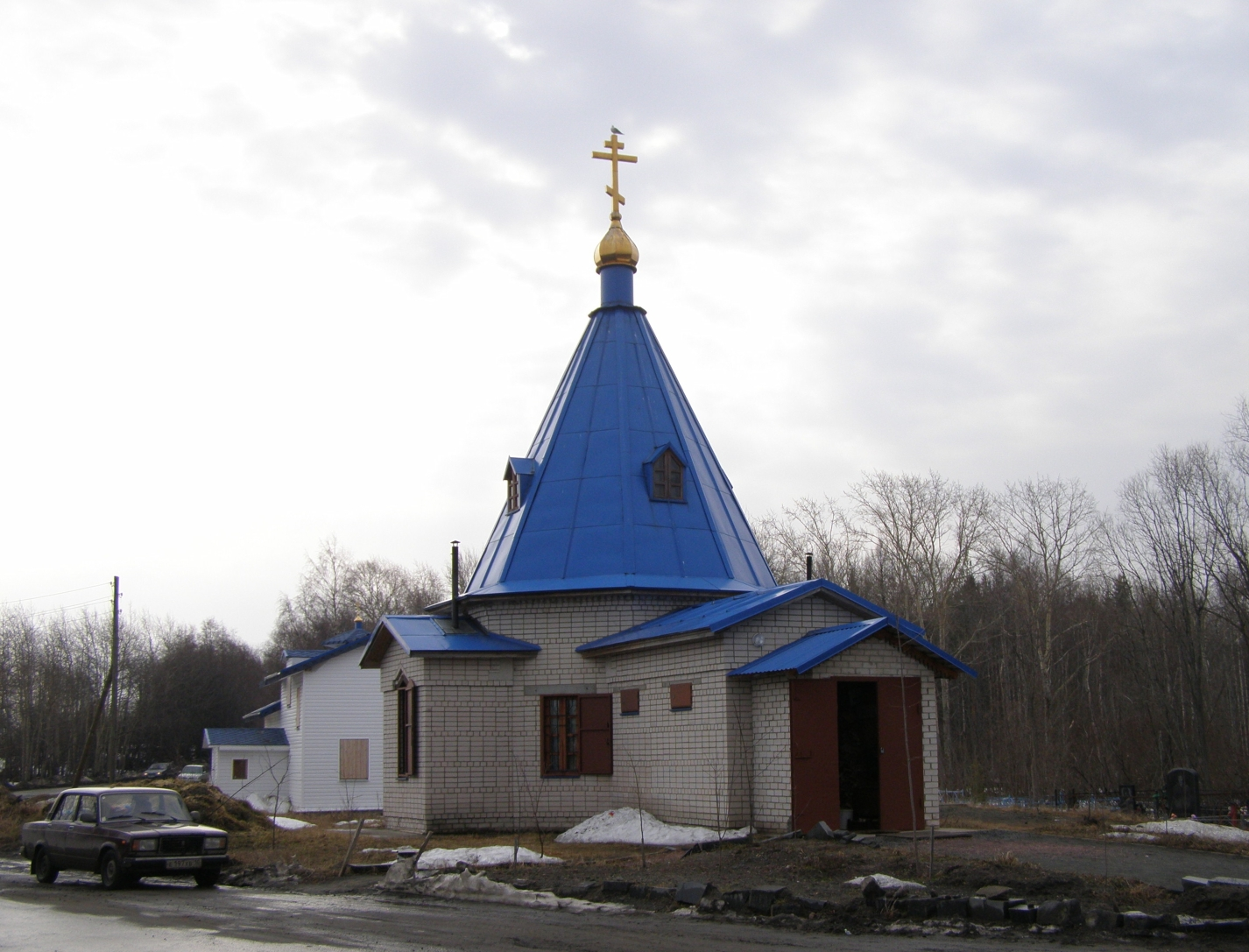 Храм во имя Дмитрия Солунского в Петрозаводске